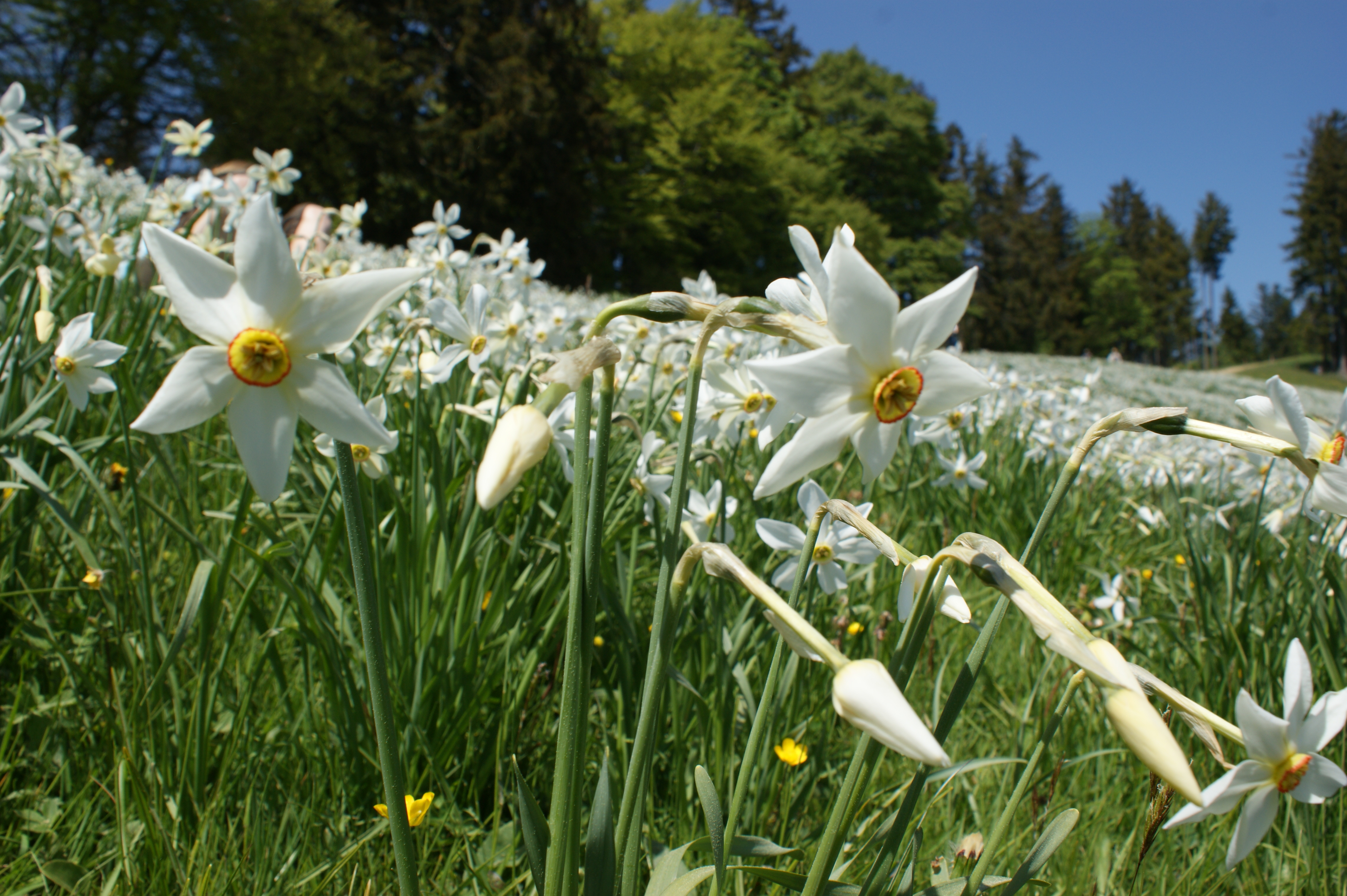 Weiße Narzissen auf Les Pléiades